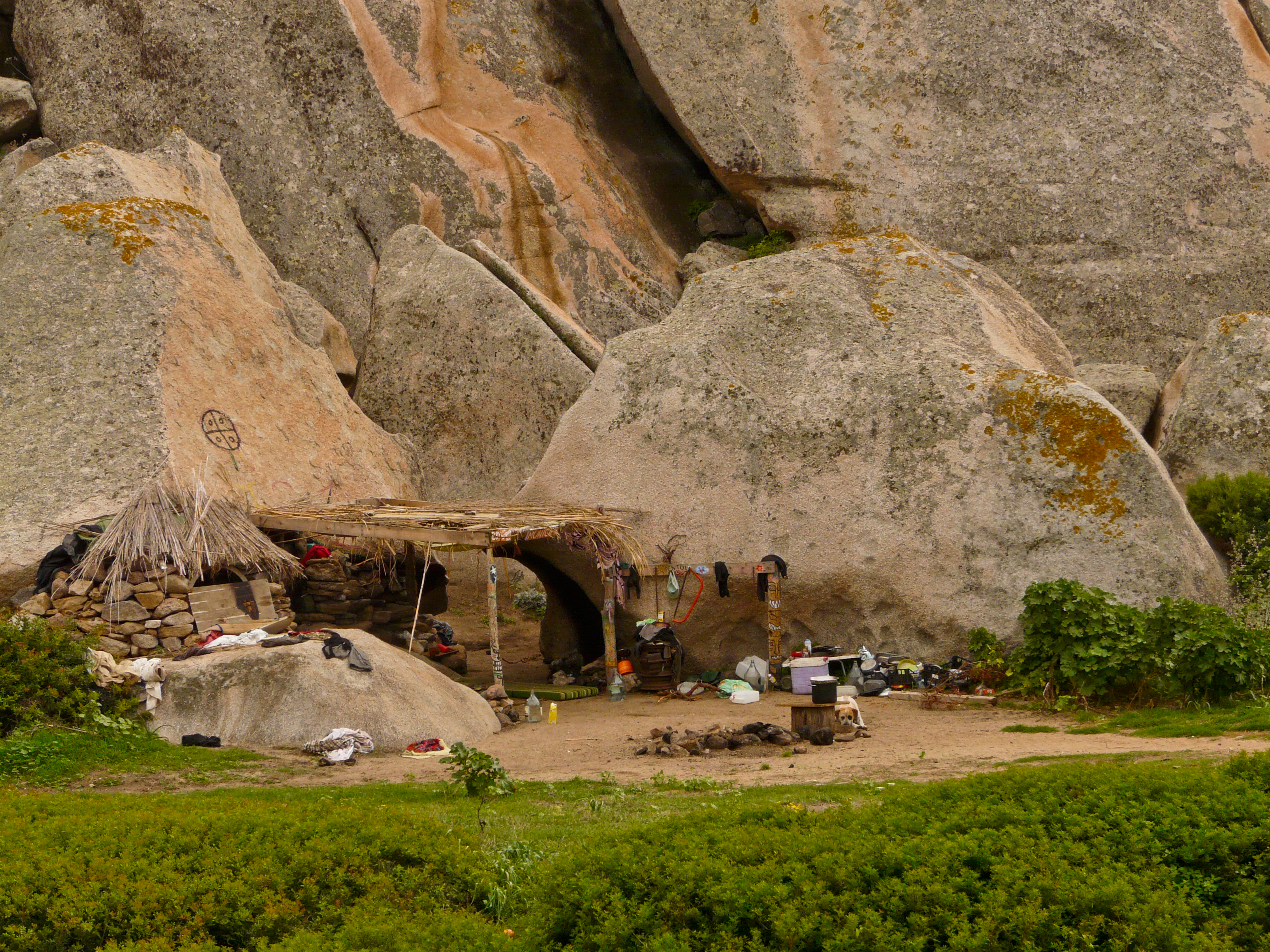 Höhle mit Vorbau eines Hippies im Valle de Luna, Capo Testa auf Sardinien